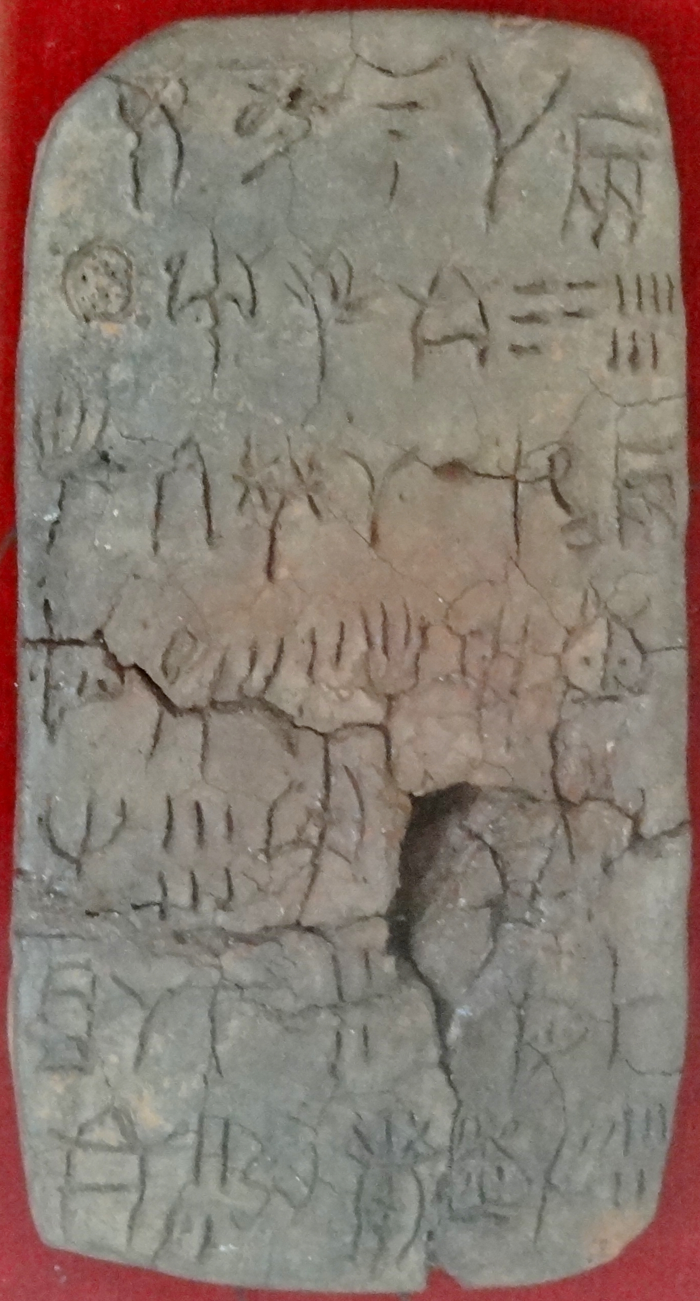 Tontafel mit Linearschrift A aus dem Palast von Zakros, Archäologisches Museum von Sitia, Kreta, Griechenland